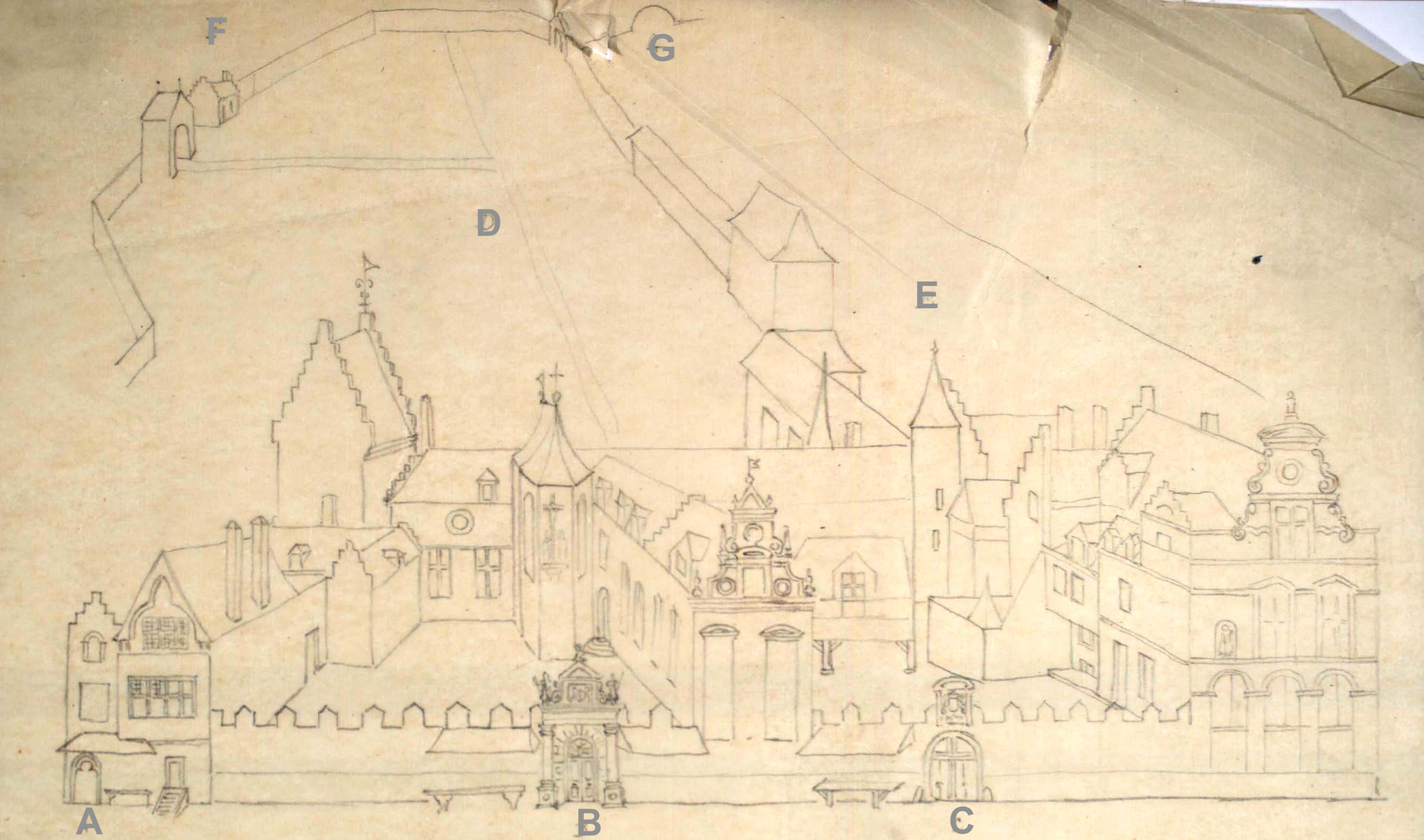 Ce fichier est recadré pour être utilisé dans les articles, pour le fichier d'origine voir : Légende sur le documentA Maifon [maison] du GardeB Hotel du Bureau des Finances (1779)C Hotel du 1er ... [illisible]D Jardin dudit hotel (où a été conftruit [construit] le temple hollandais)E DeûleF Place de l'arbalèteG Pont d'amour